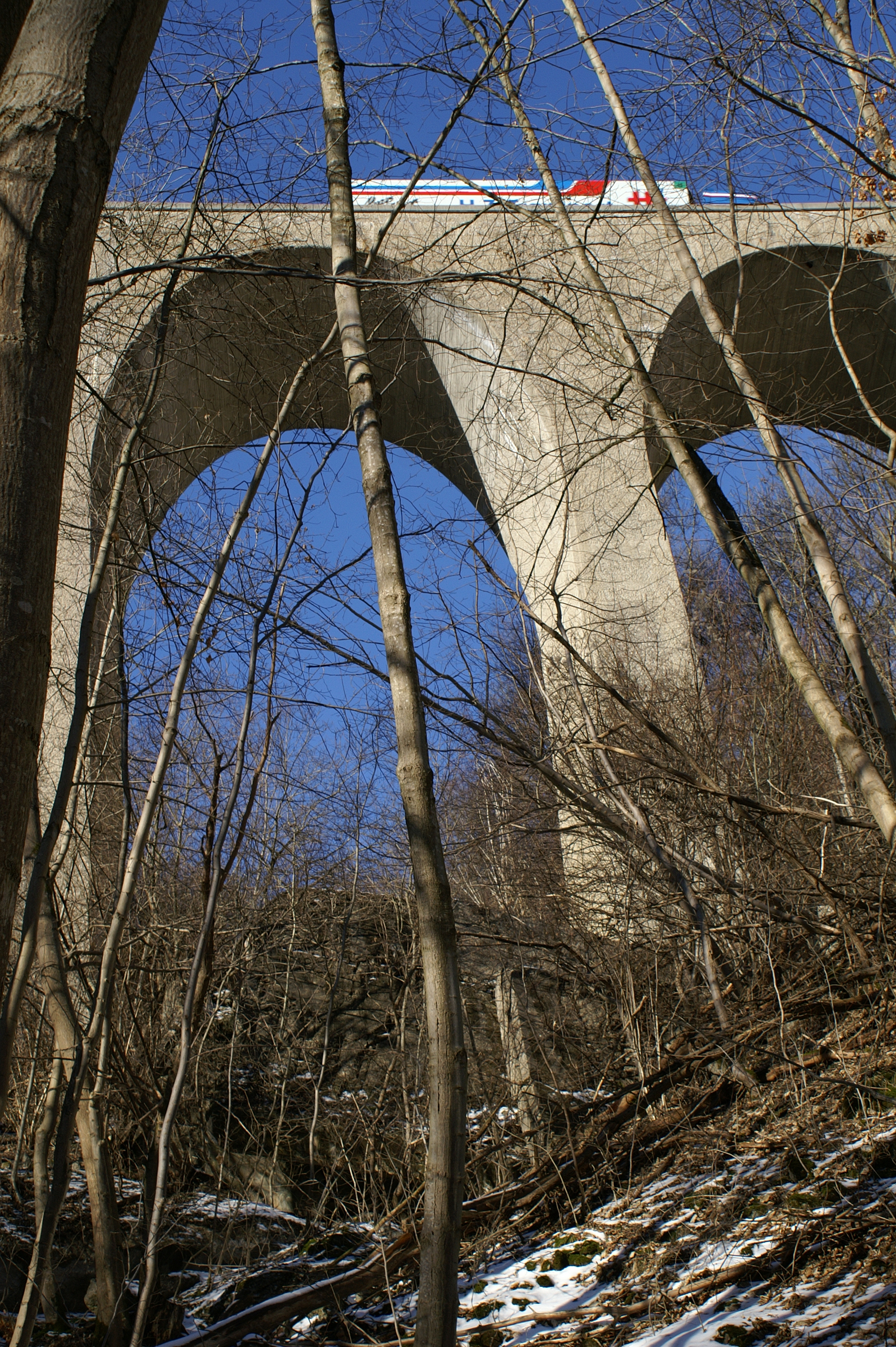 Drachenlochbrücke; Ansicht vom Parkplatz im Gosbachtal